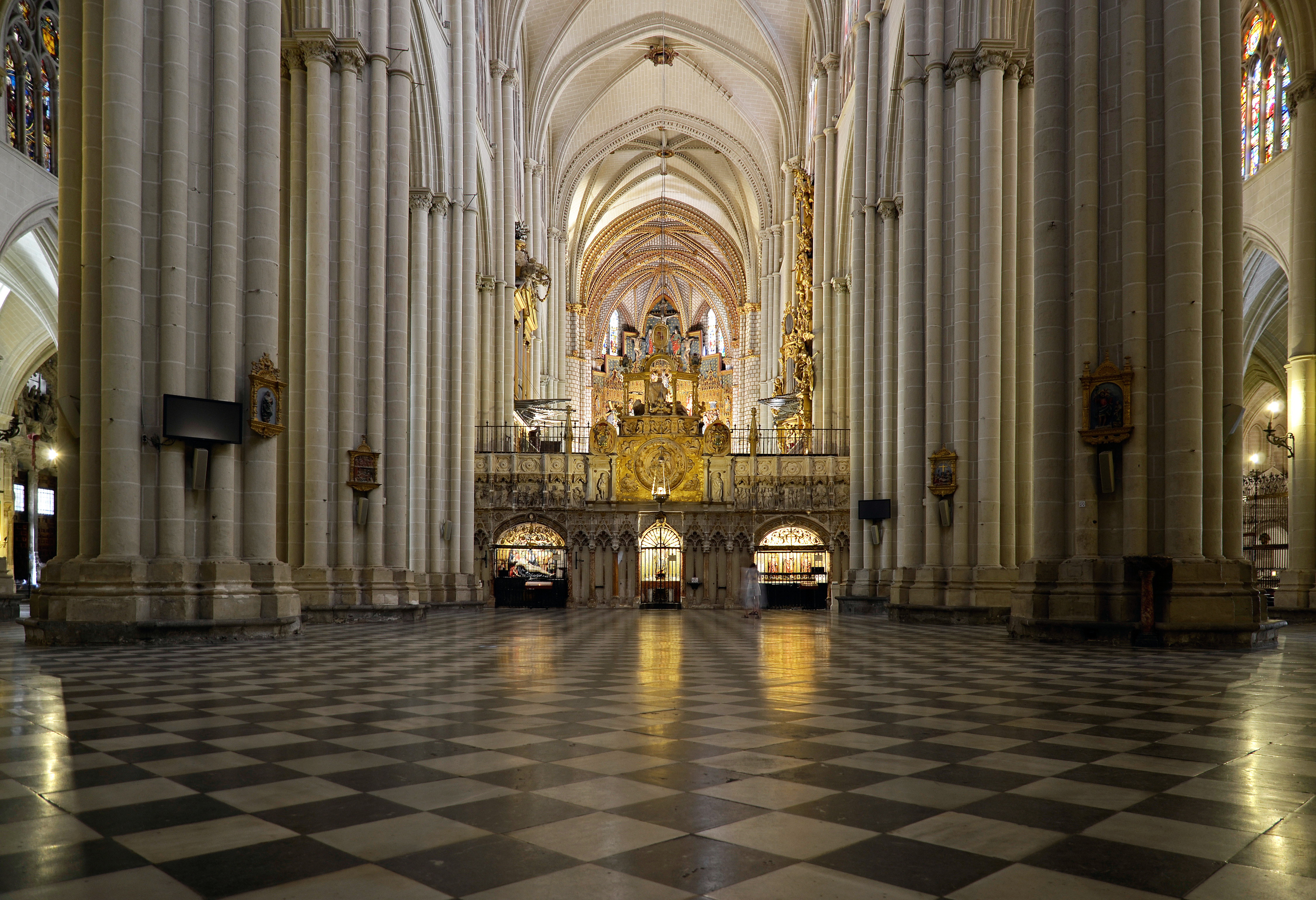 Catedral de Santa María - Toledo